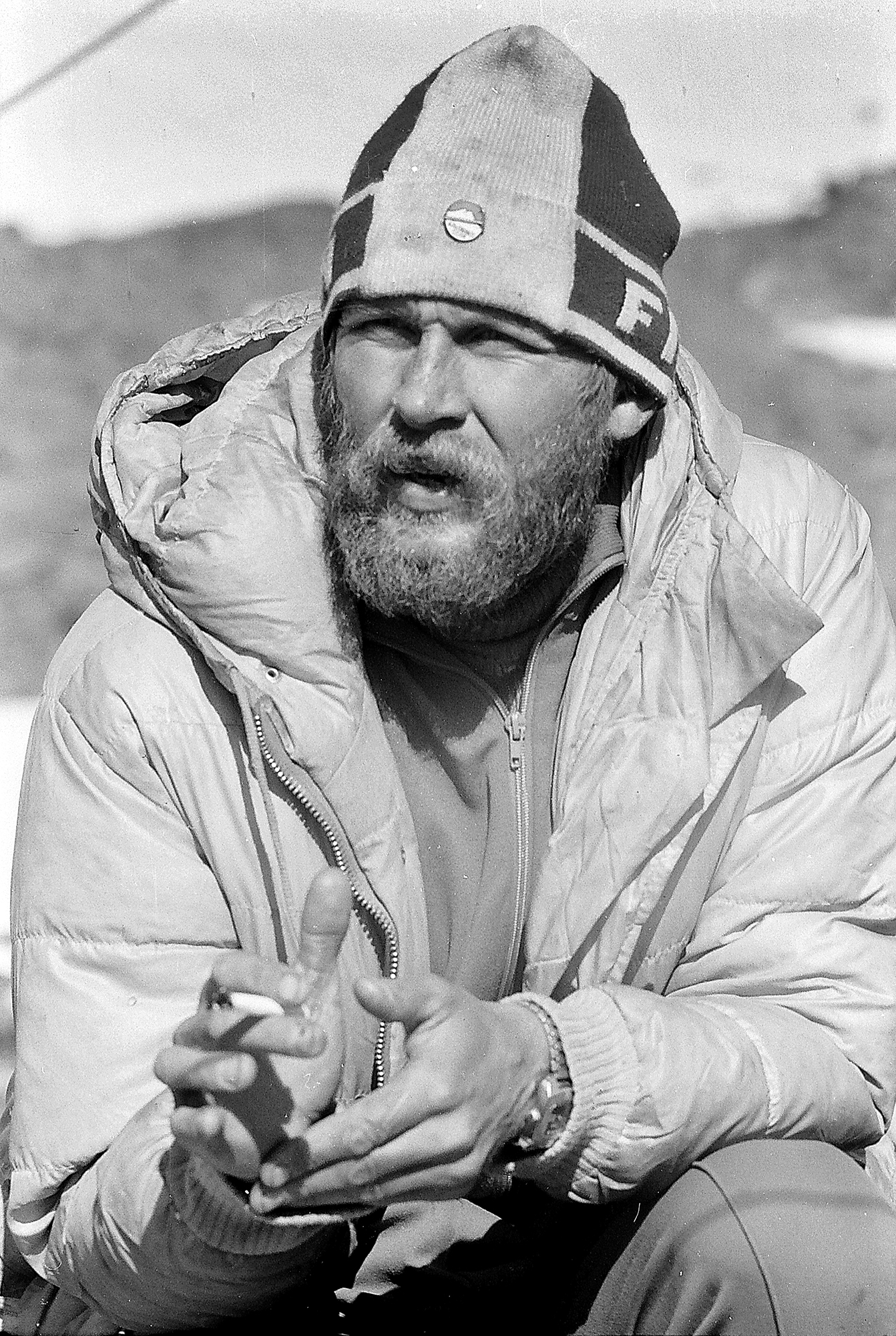 Andres Paris